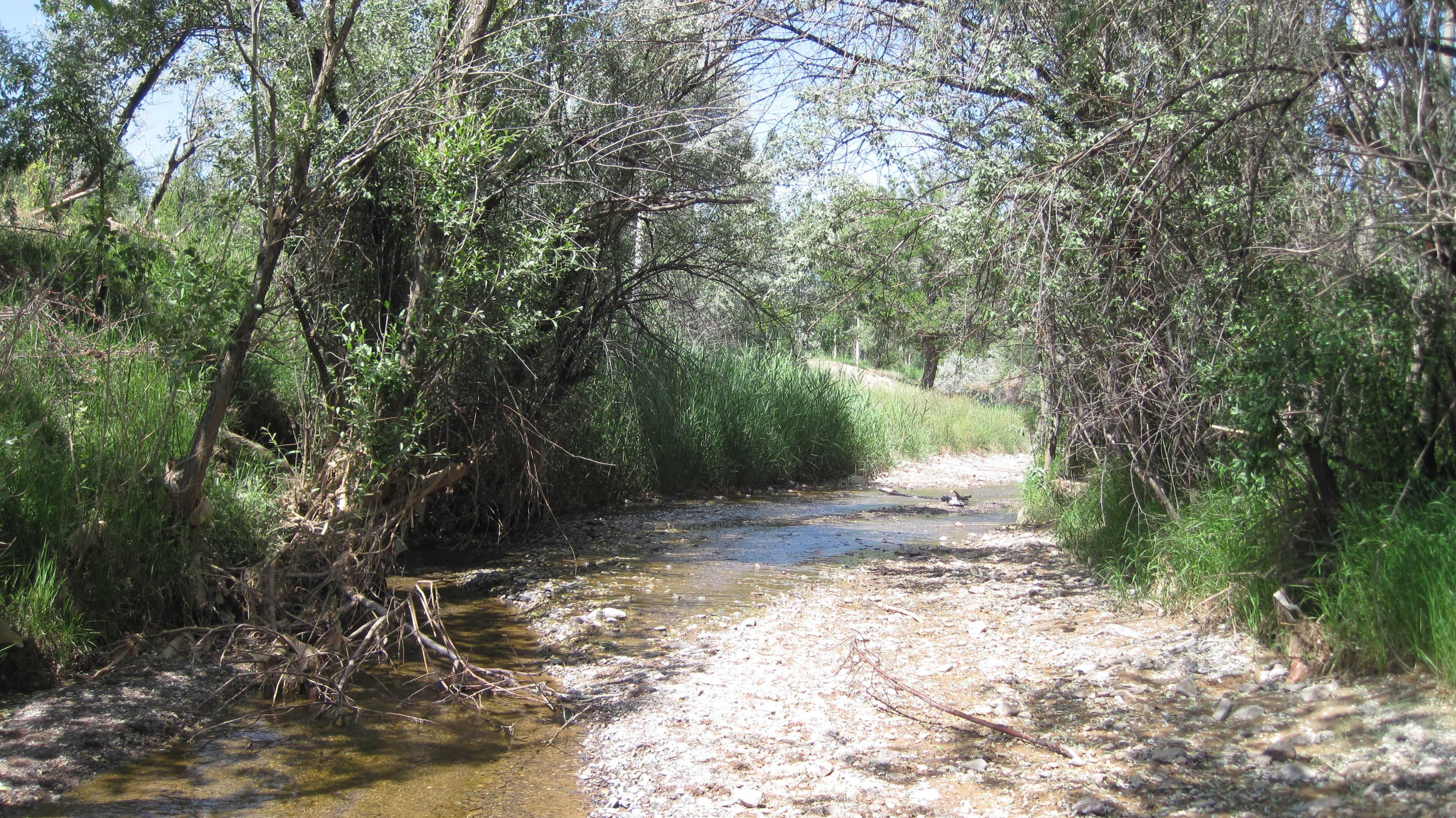 این عکس مربوط به رودخانه کال آب خرق می باشد که باعث شکوفایی تمدن های هزاره پنجم قبل از میلاد ازجمله نانوی تپه و جاذبه گردشگری در منطقه بام و صفی اباد گردیده است